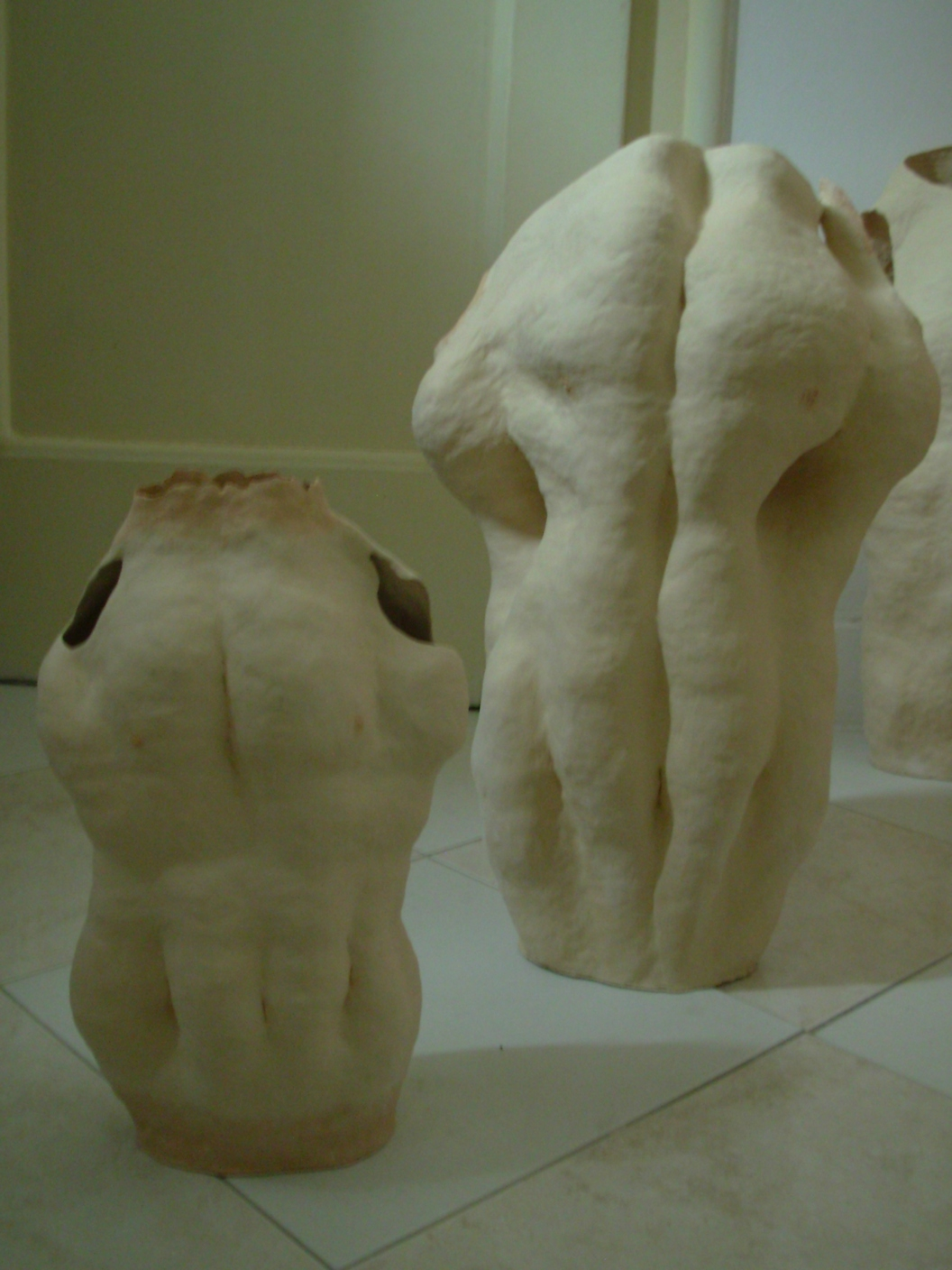 Srpski (latinica): Vladislava Krstić terakota